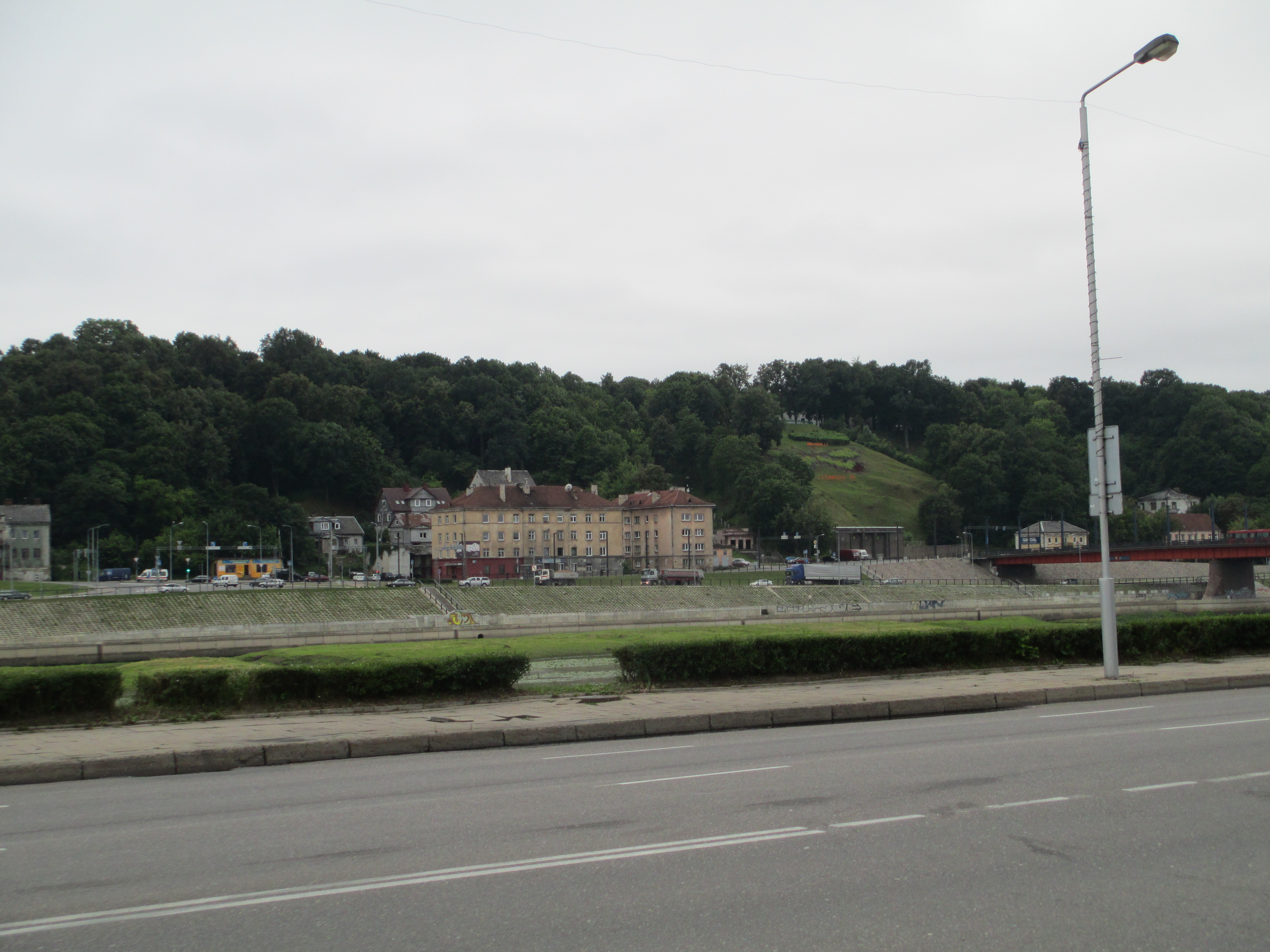 גבעת אלקסוטס בקובנה